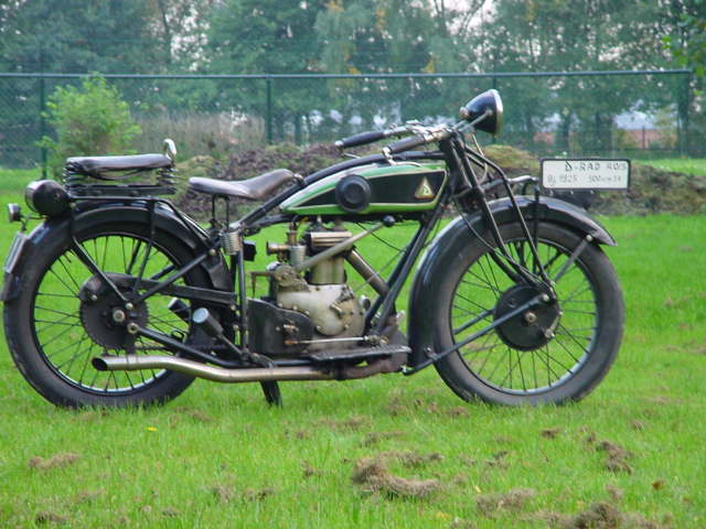 Toestemming van Yesterdays Antique Motorcycles (